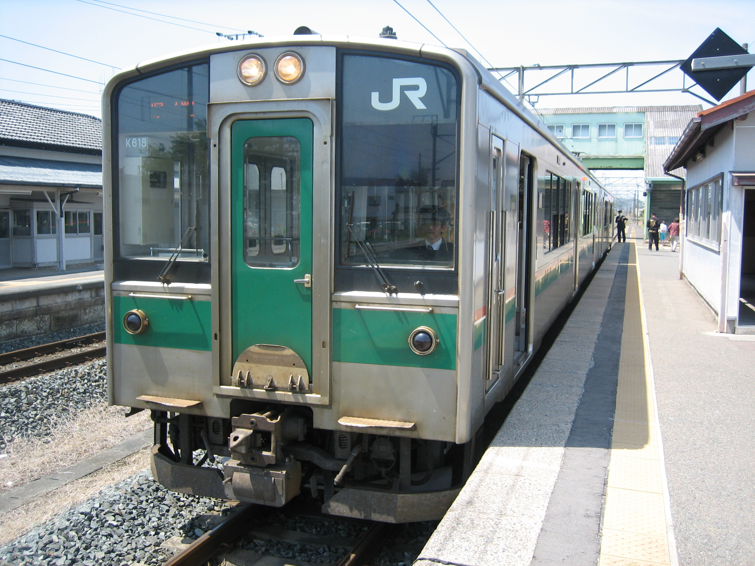 JR常磐線鹿島駅に停車中の701系、勝田車両センター所属車